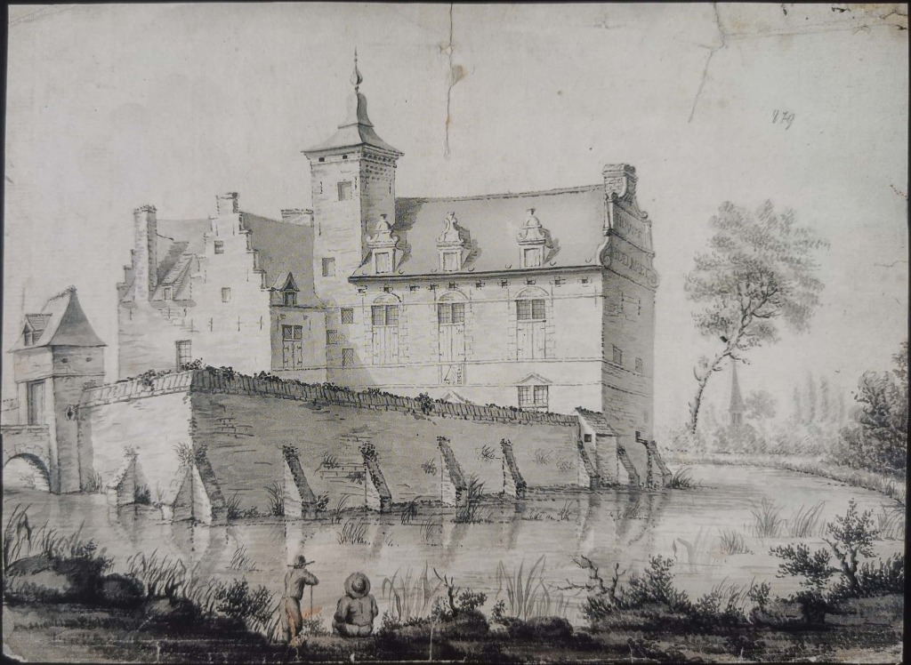 Anoniem, eind 18e eeuw, Het huis van Jan Baptista Houwaert in Sint-Joost-ten-Node (Museum van de Stad Brussel)